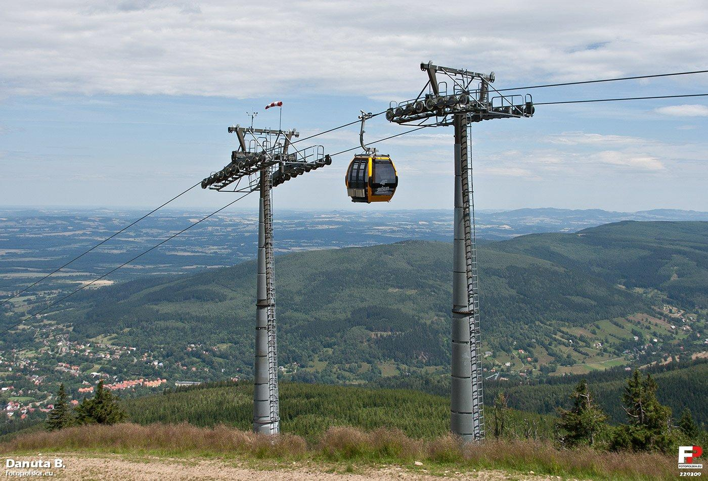 Słupy podtrzymujące linę, na której zawieszone są wagoniki. Jest ich 71, krążą w kółko, jak winda pater noster. Jazda na szczyt trwa ok. 7 minut.